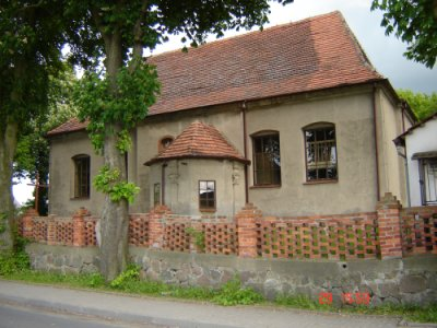 Serock Pomorski - rzymskokatolicki kościół filialny p.w. Niepokalanego Poczęcia NMP.